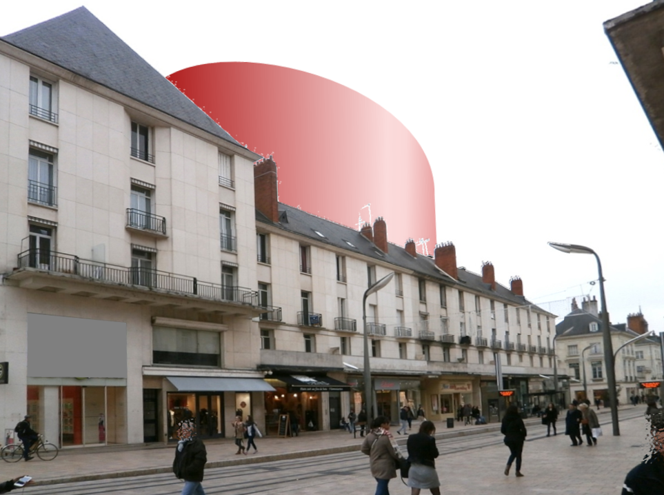 Restitution possible de la cella du temple de Tours dans une vue contemporaine de Tours